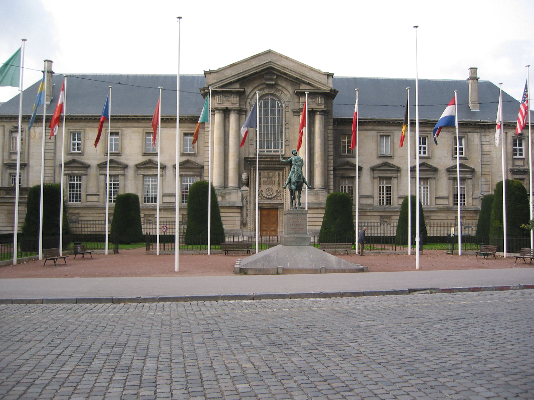 Reims, France.